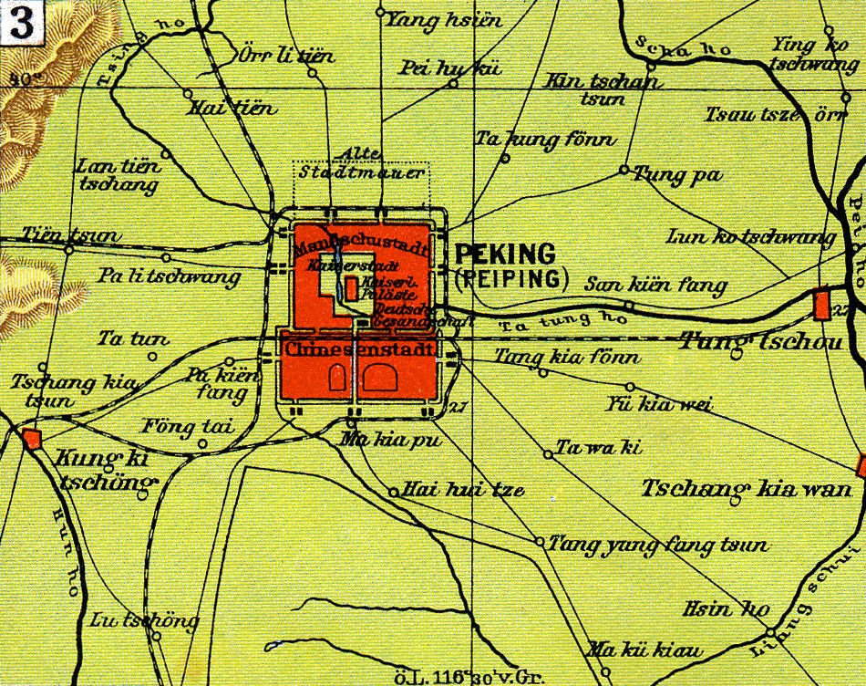 Asien, Peking und Umgebung This is a part of an old atlas. It does not represent the current situation.